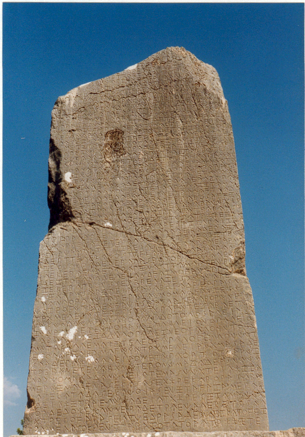 Der berühmte Inschriftenpfeiler von Xanthos berichtet in 250 Zeilen vom Sieg der Stadt über Athen. Es ist der längste überlieferte Text in lykischer Sprache.